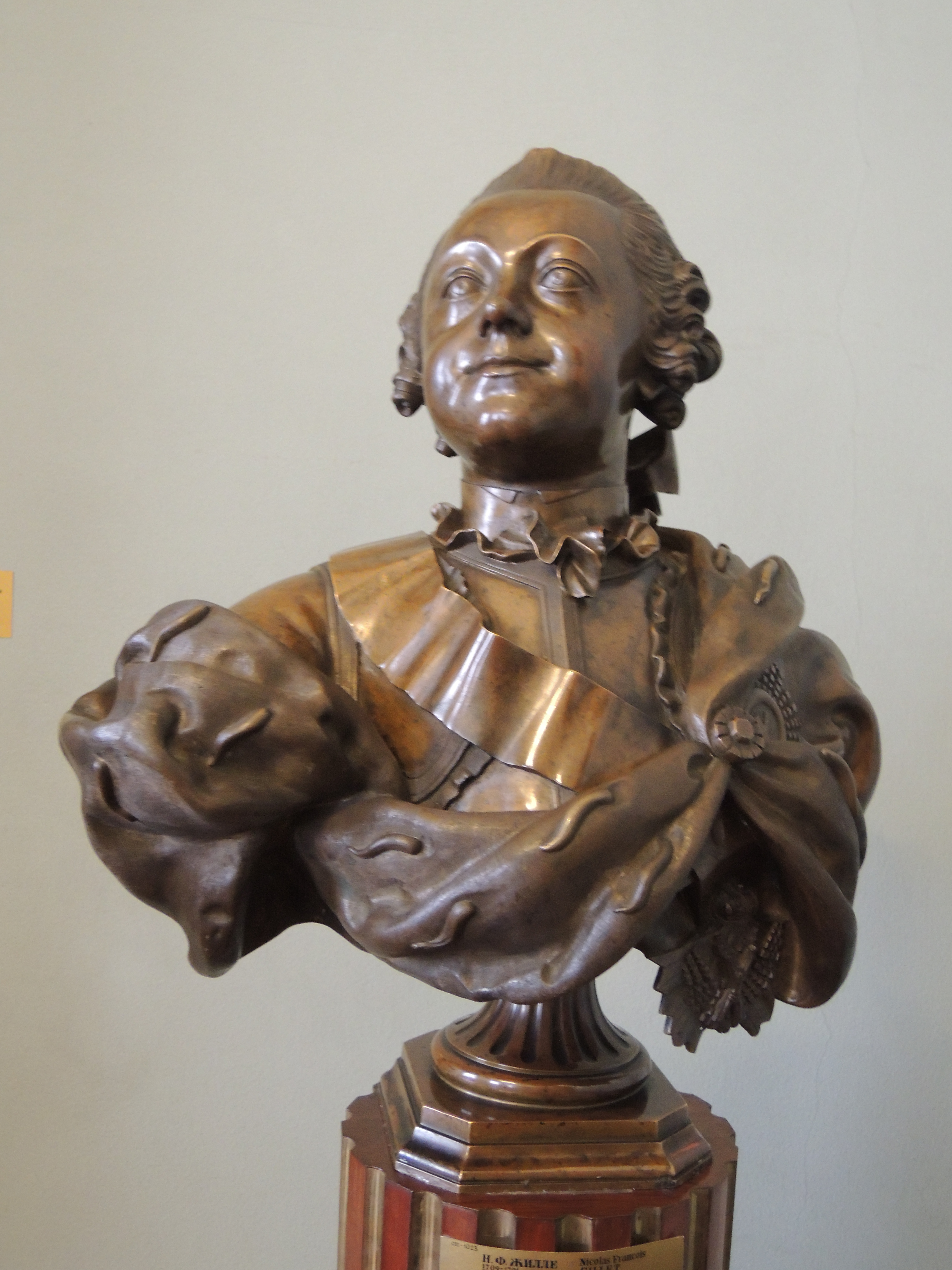 Бюст вел. кн. Павла Петровича (Павла I). Скульптор Н.Ф. Жилле. 1765. ГРМ